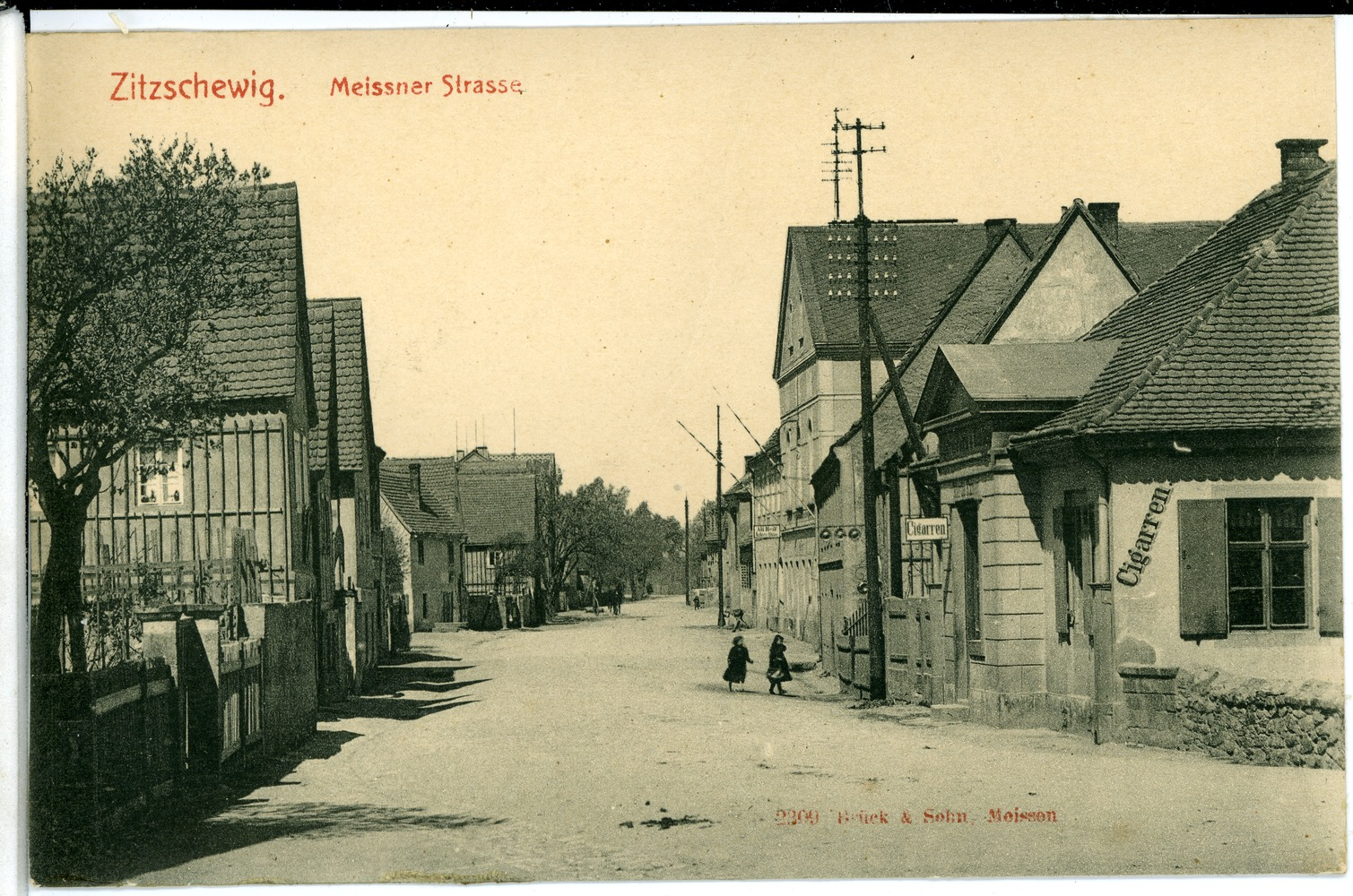 Zitzschewig; Meißner Straße This postcard is from publisher Brück & Sohn in Meißen ( postcard has a unique number 02309 and is available in a higher resolution at the publisher. This images was uploaded in a cooperation project between Wikipedians and the publisher.